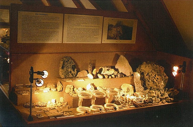 Museum_Mannersdorf-Blauer_Bruch